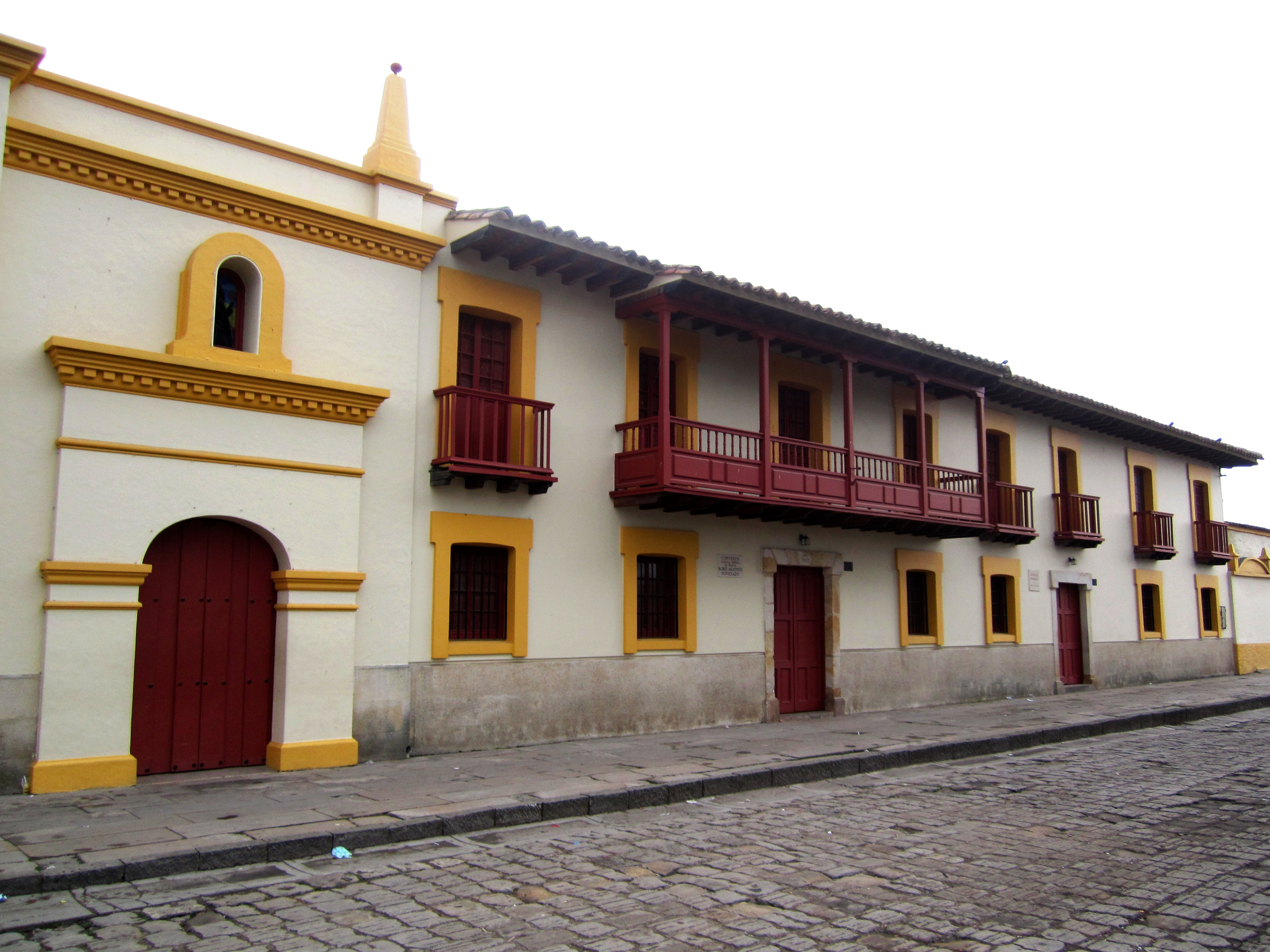 Plaza central de la localidad de Bojacá en Cundinamarca.